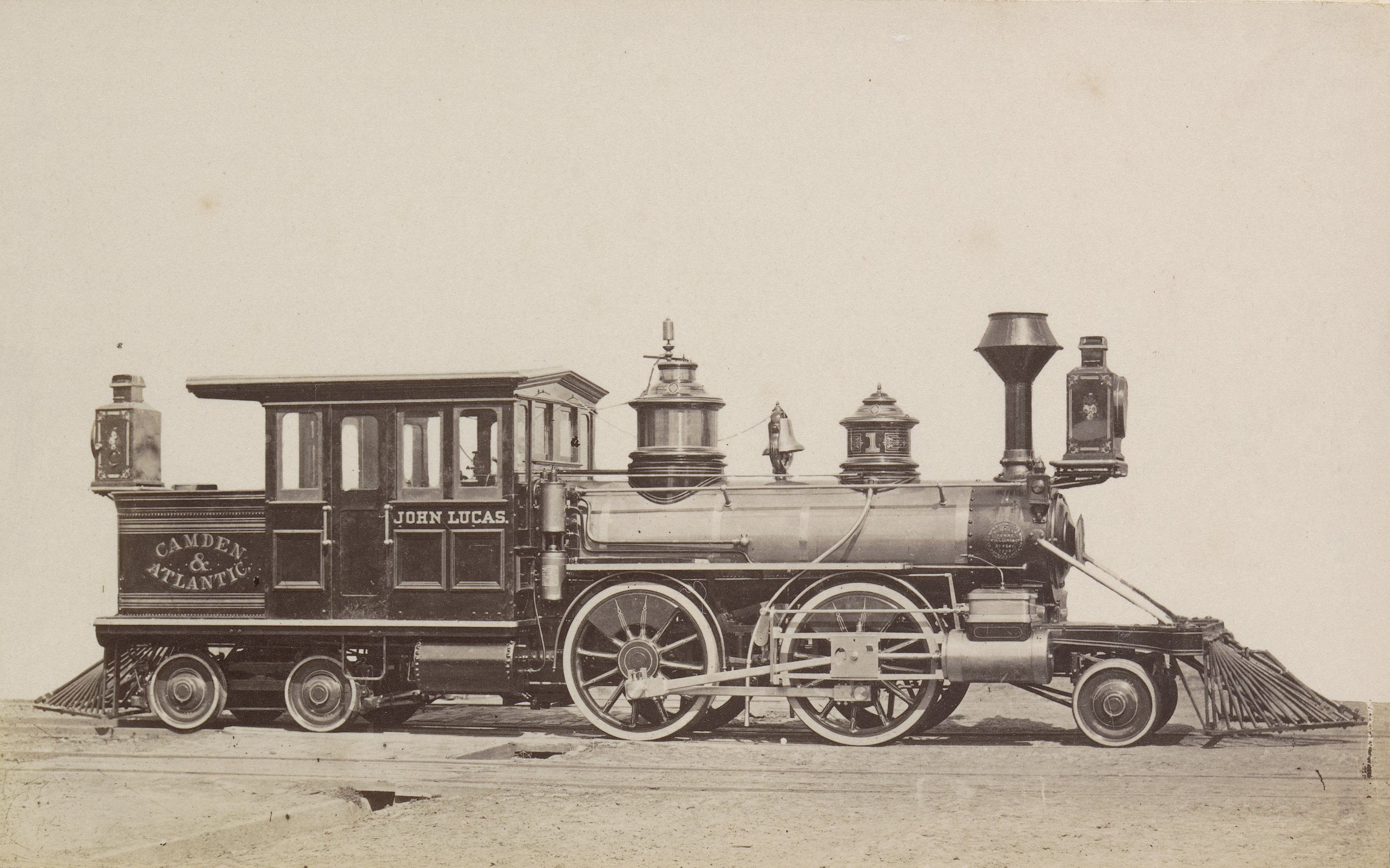 IdentificatieTitel(s): Amerikaanse stoomlocomotiefObjecttype: foto bladzijde Objectnummer: RP-F-2001-7-998-15VervaardigingVervaardiger: fotograaf: anoniemPlaats vervaardiging: Verenigde Staten van AmerikaDatering: ca. 1871 - in of voor 1881Materiaal: fotopapier Techniek: albuminedrukAfmetingen: foto: h 125 mm × b 200 mmToelichtingFoto op pagina 139.OnderwerpWat: steam locomotiveVerwerving en rechtenCredit line: Aankoop met steun van de Mondriaan Stichting, het Prins Bernhard Cultuurfonds, het VSBfonds, het Paul Huf Fonds/Rijksmuseum Fonds en het Egbert KunstfondsVerwerving: aankoop 2001Copyright: Publiek domein